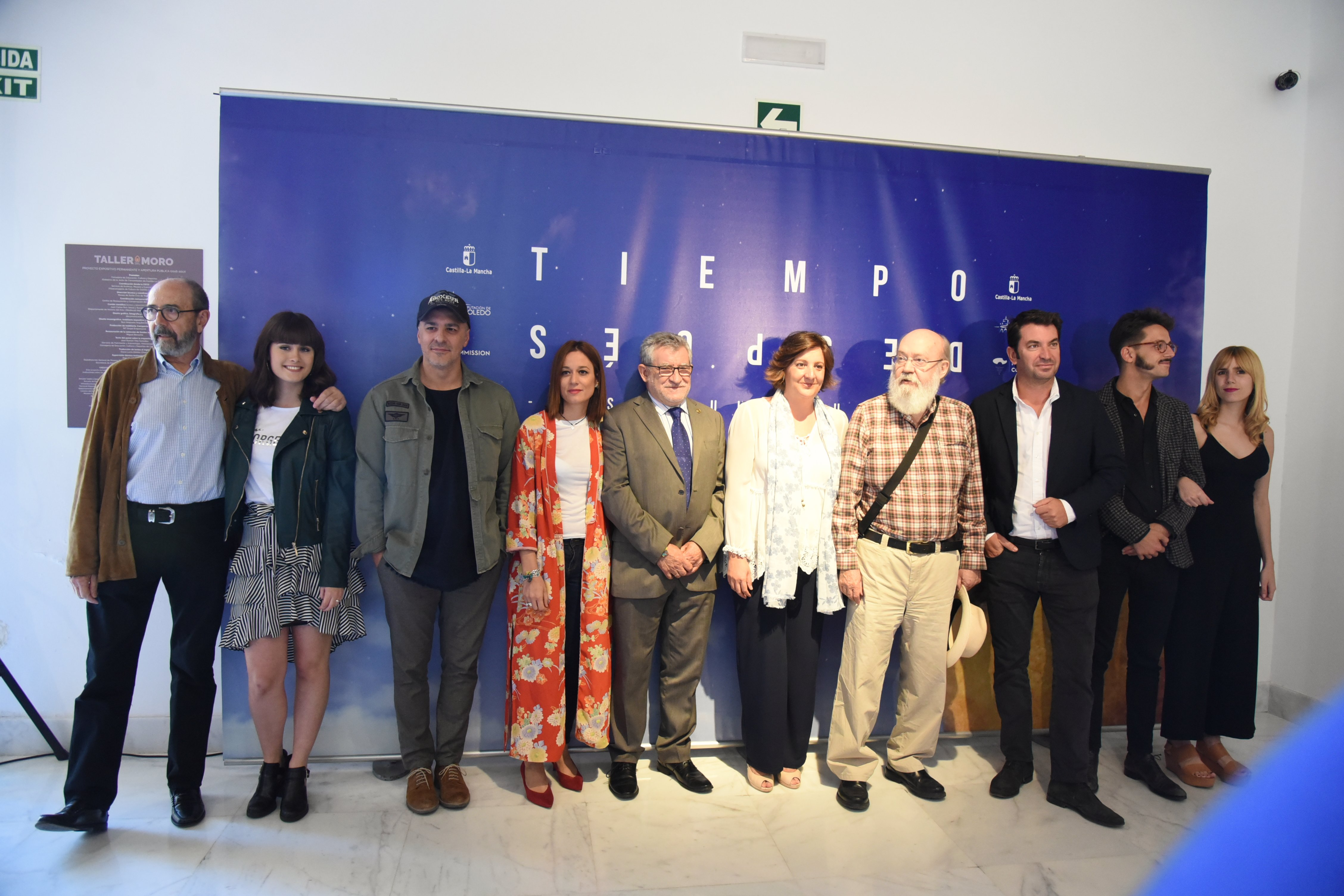 TOLEDO, 9 de octubre de 2017.- La consejera de Economía, Empresas y Empleo, Patricia Franco, y el consejero de Educación, Cultura y Deportes, Ángel Felpeto, asisten, en el Taller del Moro, a la presentación de la última película de José Luis Cuerda ‘Tiempo después’. (Fotos: José Ramón Márquez // JCCM)